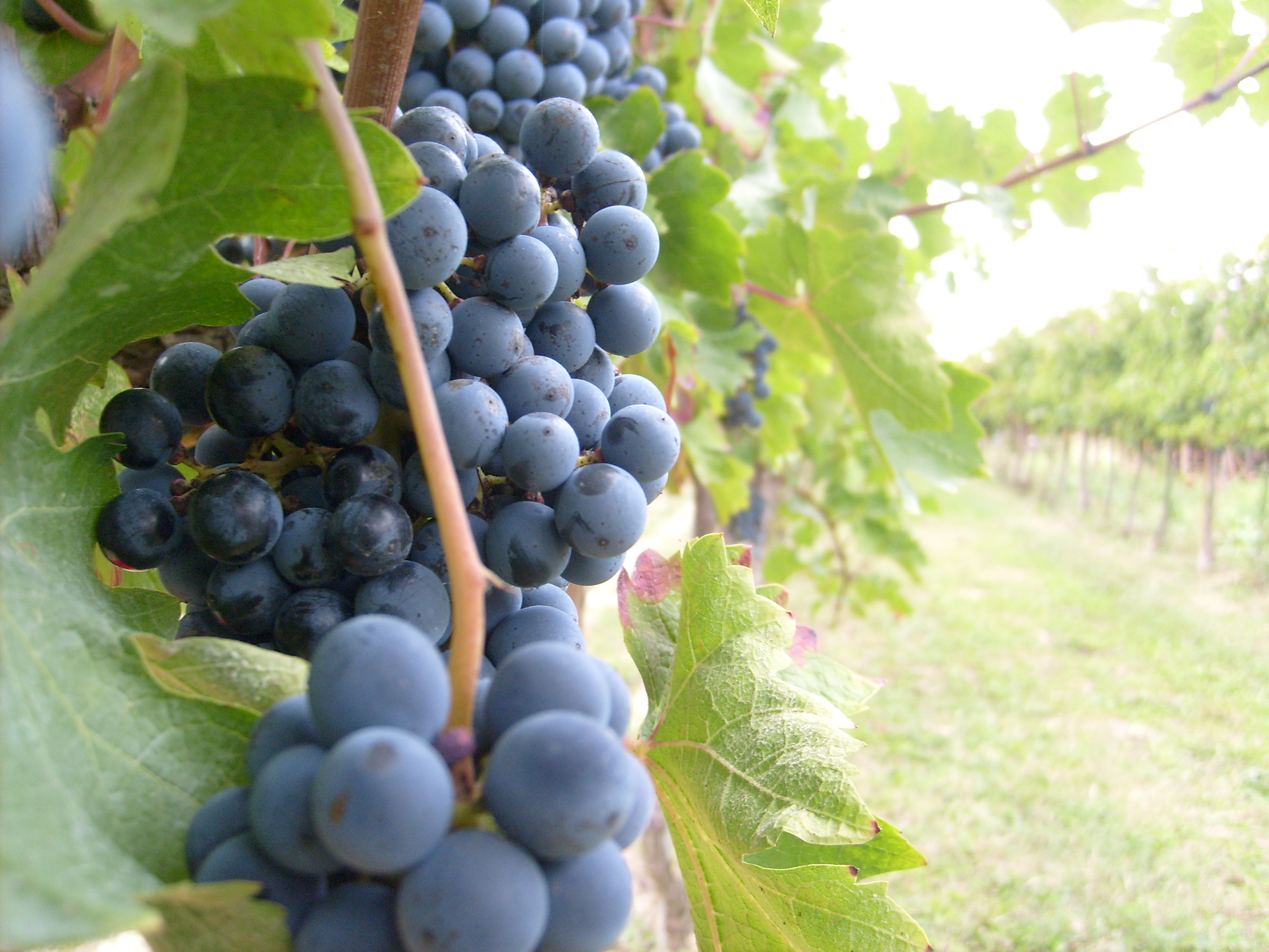 Grappolo e filare di uva rossa a Marcon, in provincia di Venezia